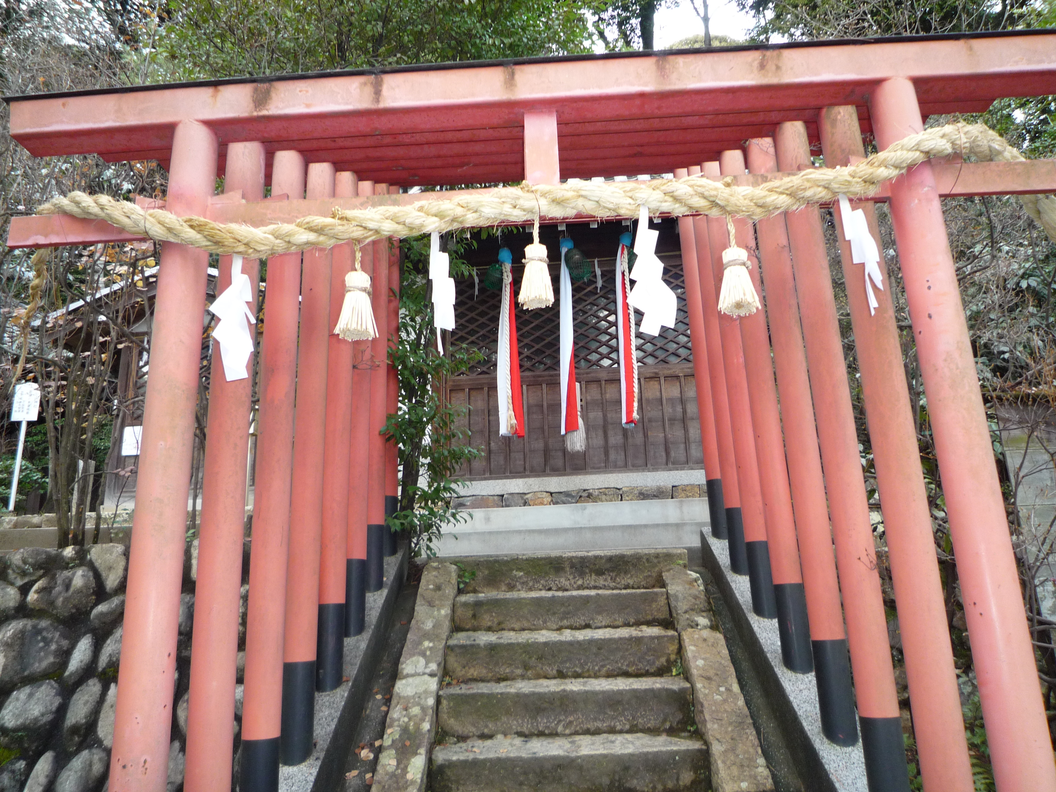 春日神社山神社